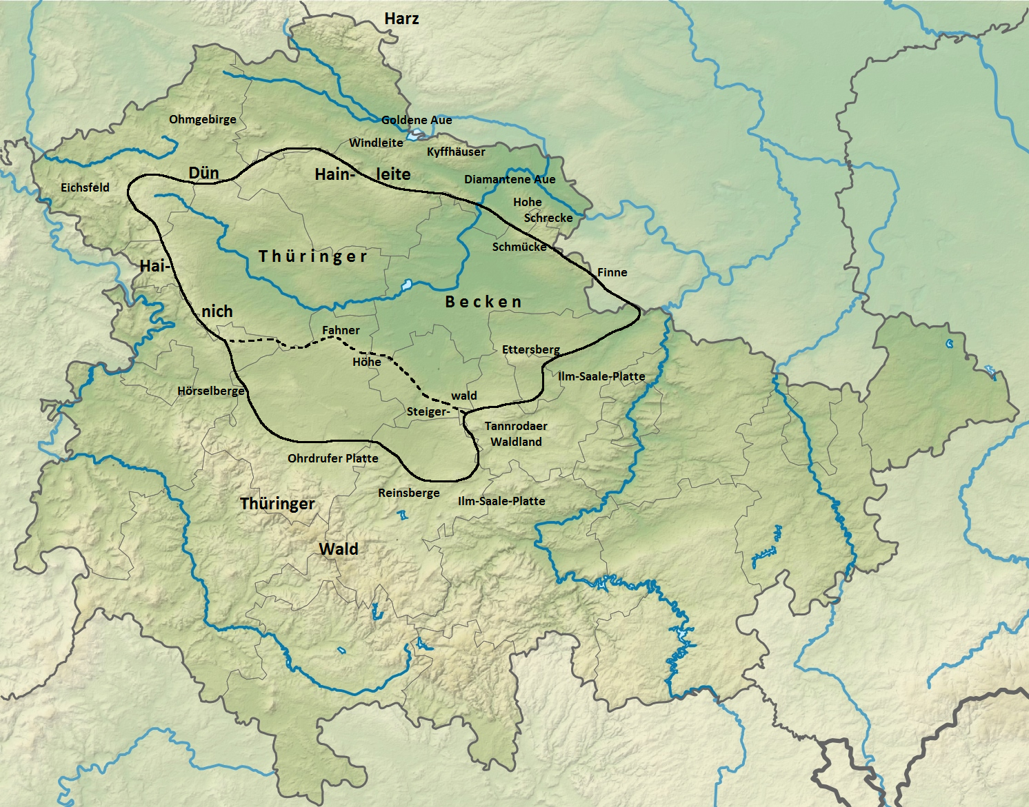 Das Thüringer Becken und angrenzende Landschaften.